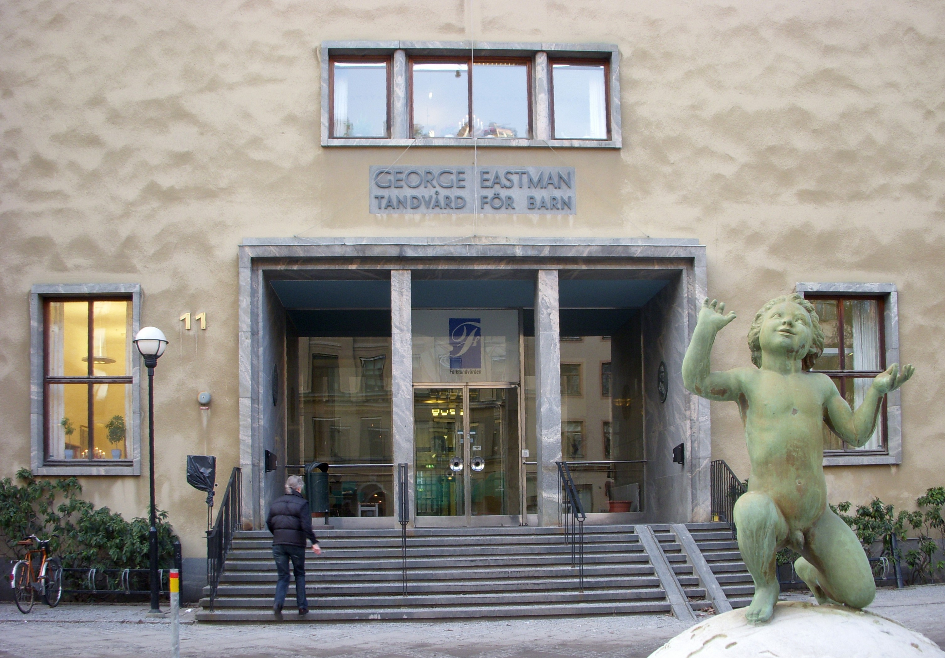 Eastmaninstitutet och Eastmanfontänen i Stockholm